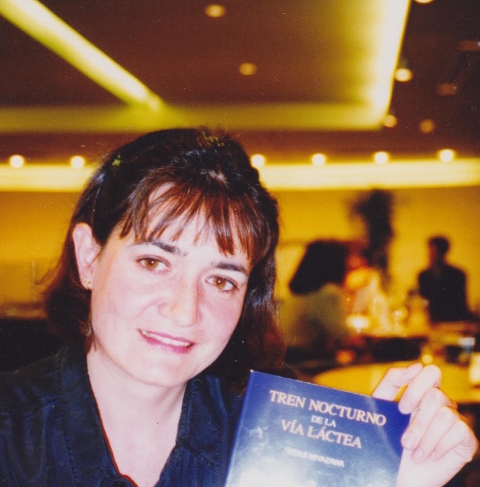 Montse Watkins, Tokio, 1994, publicación de la primera traducción directa del japonés del libro de Kenji Miyazawa en su editorial Luna Books.